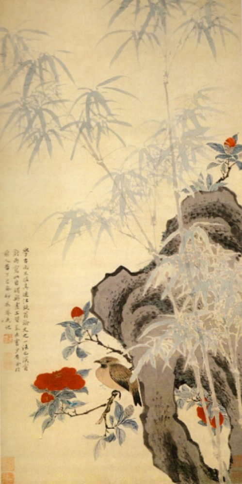 Fleurs, bambous et oiseaux au repos par le peintre chinois Wang Wu en 1967. Rouleau mural, encre et couleur sur papier, 79,8x40,4 centimètres. Cette peinture est conservée au Musée du palais impérial de Beijing.